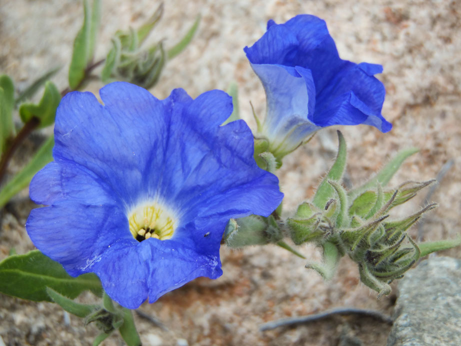 Suspiros (Nolana elegans). Parque nacional Llanos de Challe, Región de Atacama, Chile.